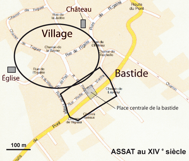 Plan d'Assat au XIVe siècle sur fond de plan contemporain